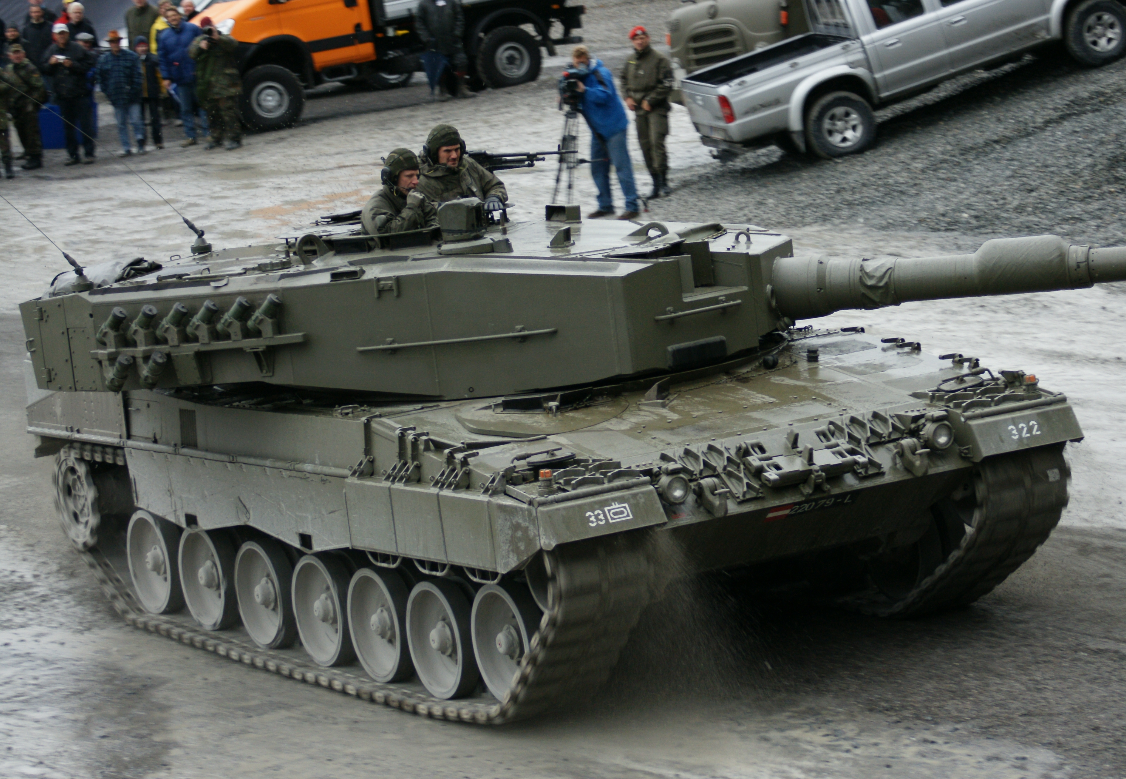 Im Zuge einer Road-Show zeigte das Österreichische Bundesheer im Dornbirner / Hohenemser Steinbruch den Kampfpanzer Leopard 2A4. Er ist das Hauptwaffensystem der österreichischen Panzertruppe. Als Hauptwaffe verfügt der Panzer über eine 120 Millimeter Kanone.